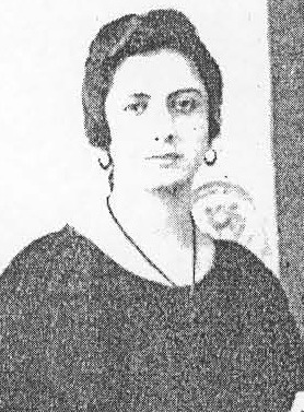 María Isabel Peralta (de pie) junto a una amiga. Fotografía de 1921.